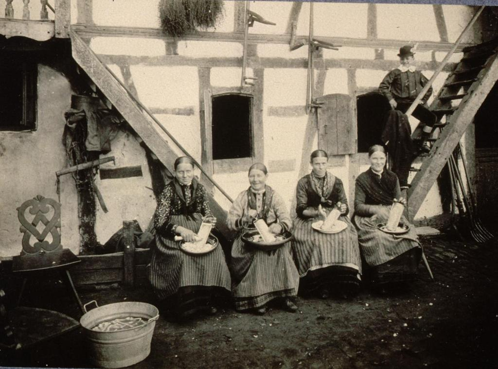 Femmes en costume de travail râpant du raifort Engwiller 1909